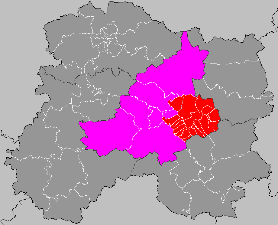 Localisation du canton de Marson